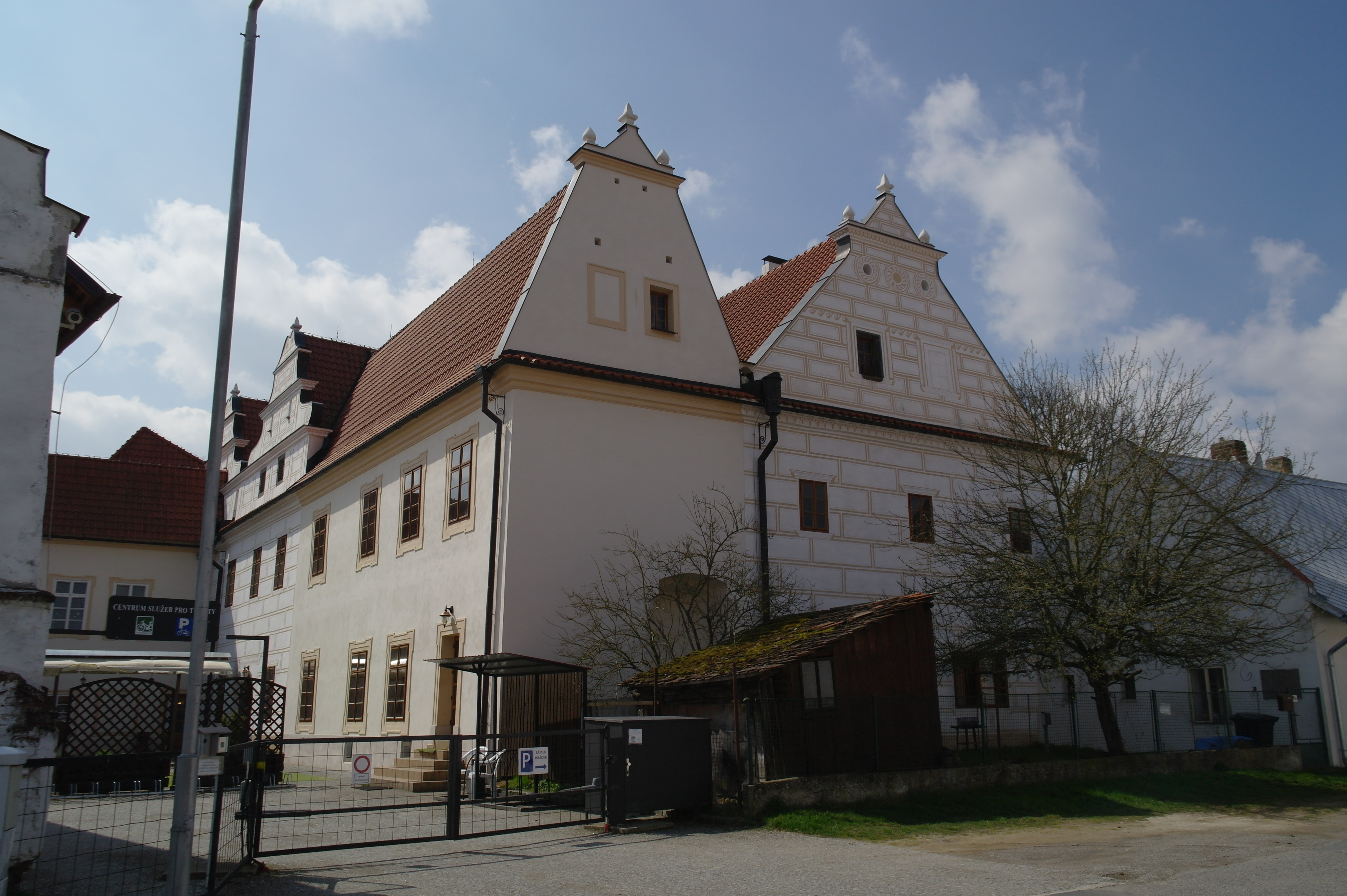 Zámek Hrádek od severu